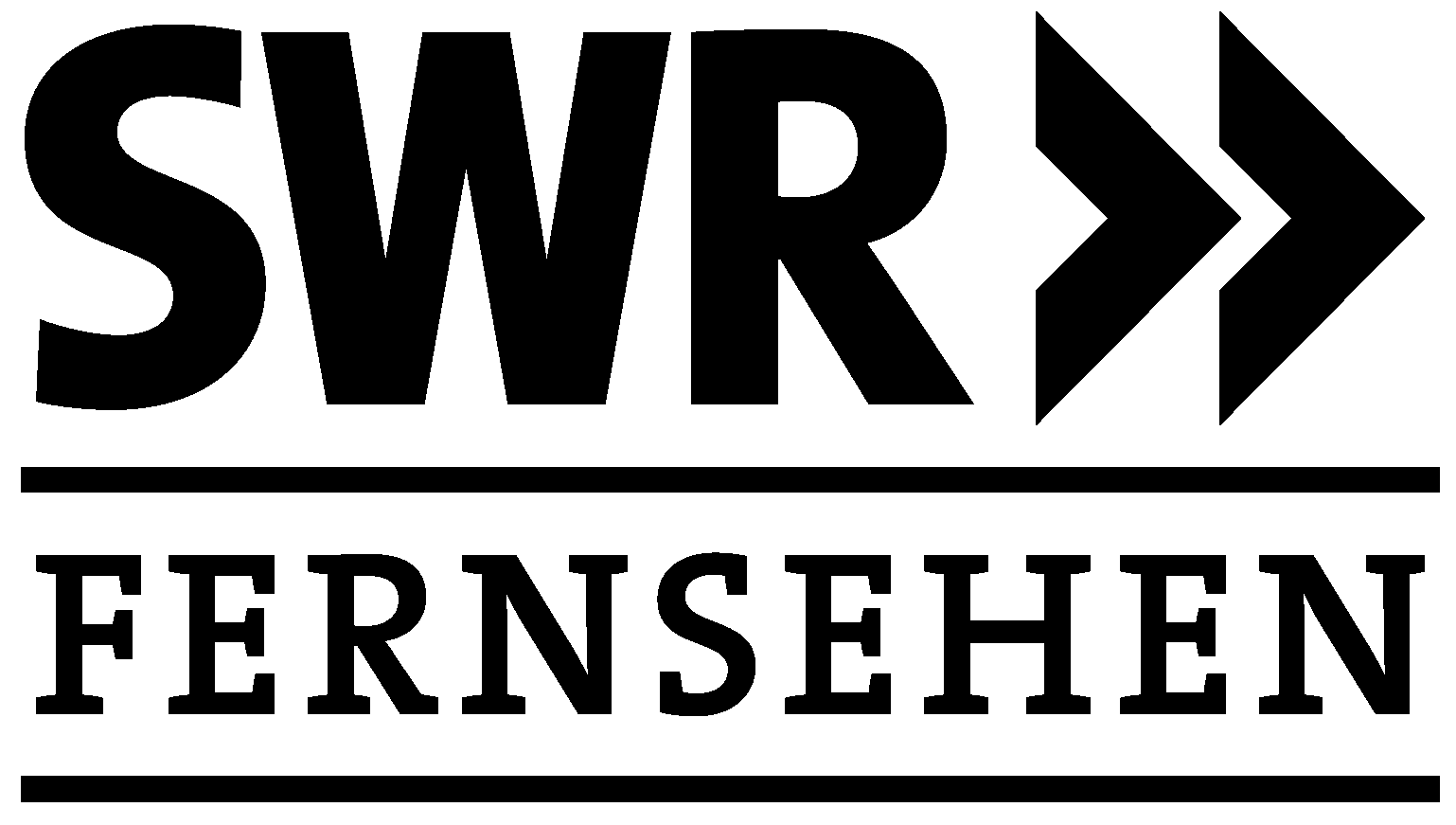 Logo des SWR FERNSEHEN - seit 6. November 2014